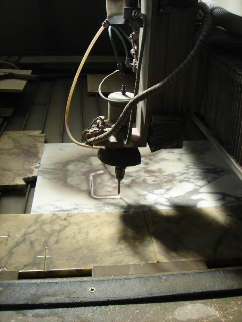 Wasserstrahl